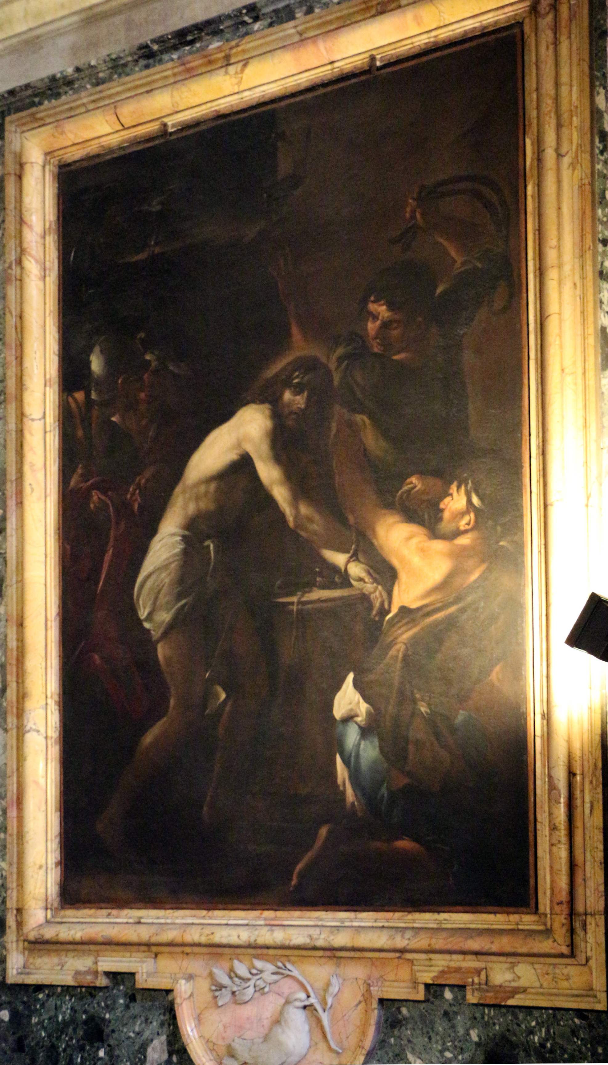 Giacinto brandi, flagellazione, 1682.JPG